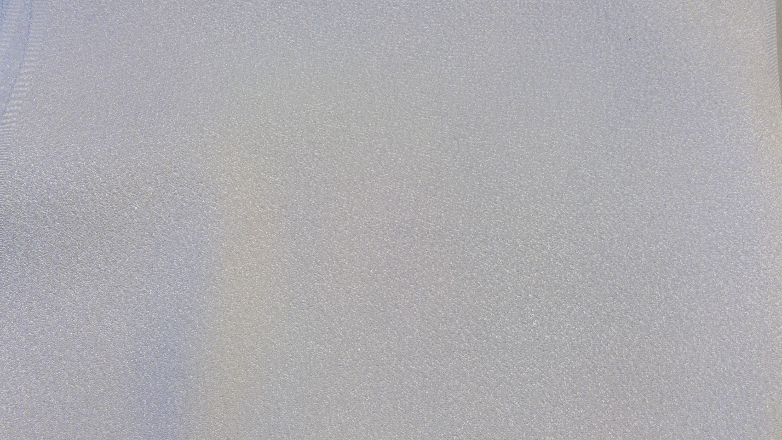 丹後ちりめんの正絹絽織りの布地。